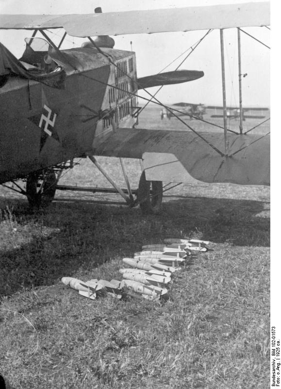 Aus dem Hauptquartier des Oberst Freydenberg. Ein französisches Bomberflugzeug fertig zur Abfahrt zum Angriff gegen die Rifkabylen. Das Hakenkreuz links im Flugzeug bildet das Schutz- und Trutzzeichen der Aeroplane.